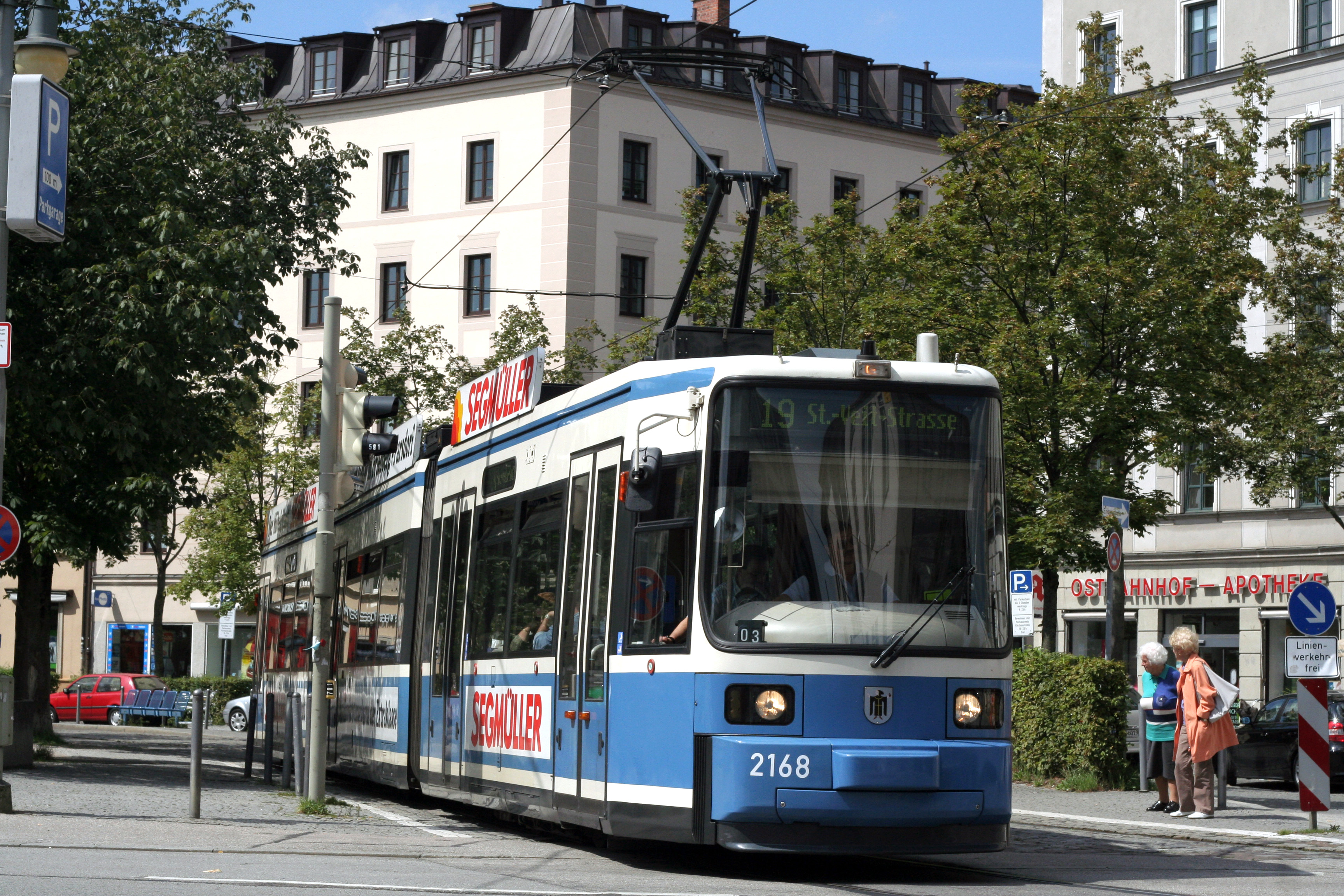 MVG 2168 te Munchen Ost Hbf